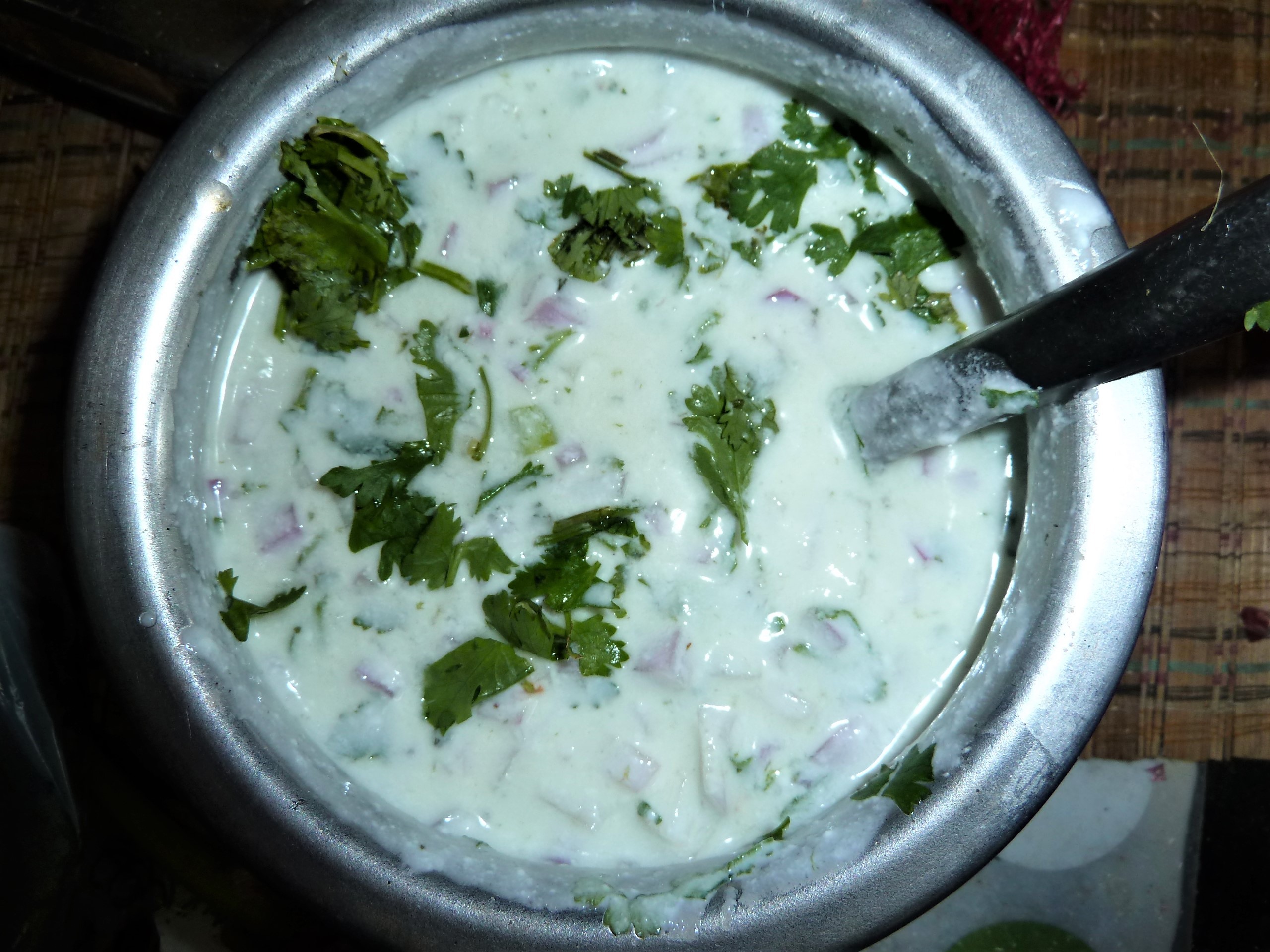 ఉల్లిపాయ పెరుగు పచ్చడి